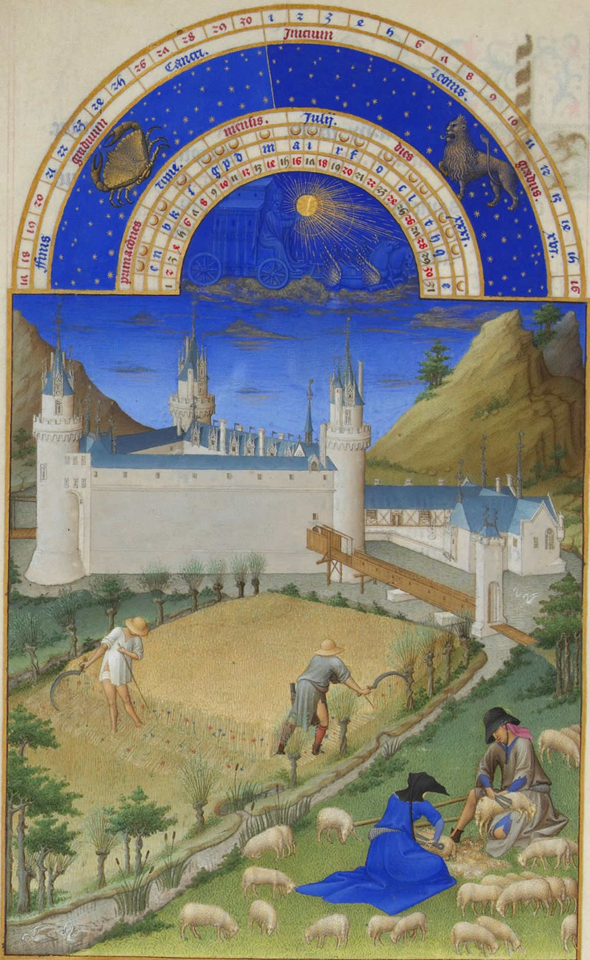 Les travaux du mois de juillet représentent la moisson et la tonte des moutons. Deux personnages fauchent les blés à l'aide d'un volant et d'une baguette. Un volant est une longue faucille ouverte dont le manche fait angle avec le plat de la lame. À l'aide de la baguette, ils dégagent un paquet de tiges qu'ils coupent en lançant le volant. Les moissonneurs avancent de l'extérieur de la parcelle en se dirigeant vers son centre en tournant. L'un d'entre eux porte une pierre à aiguiser à la ceinture. Deux autres personnages, dont une femme, coupent la laine des moutons à l'aide de forces. Exception faite des montagnes imaginaires, le paysage représente, au premier plan, la rivière Boivre se jetant dans le Clain, à proximité du palais comtal de Poitiers.